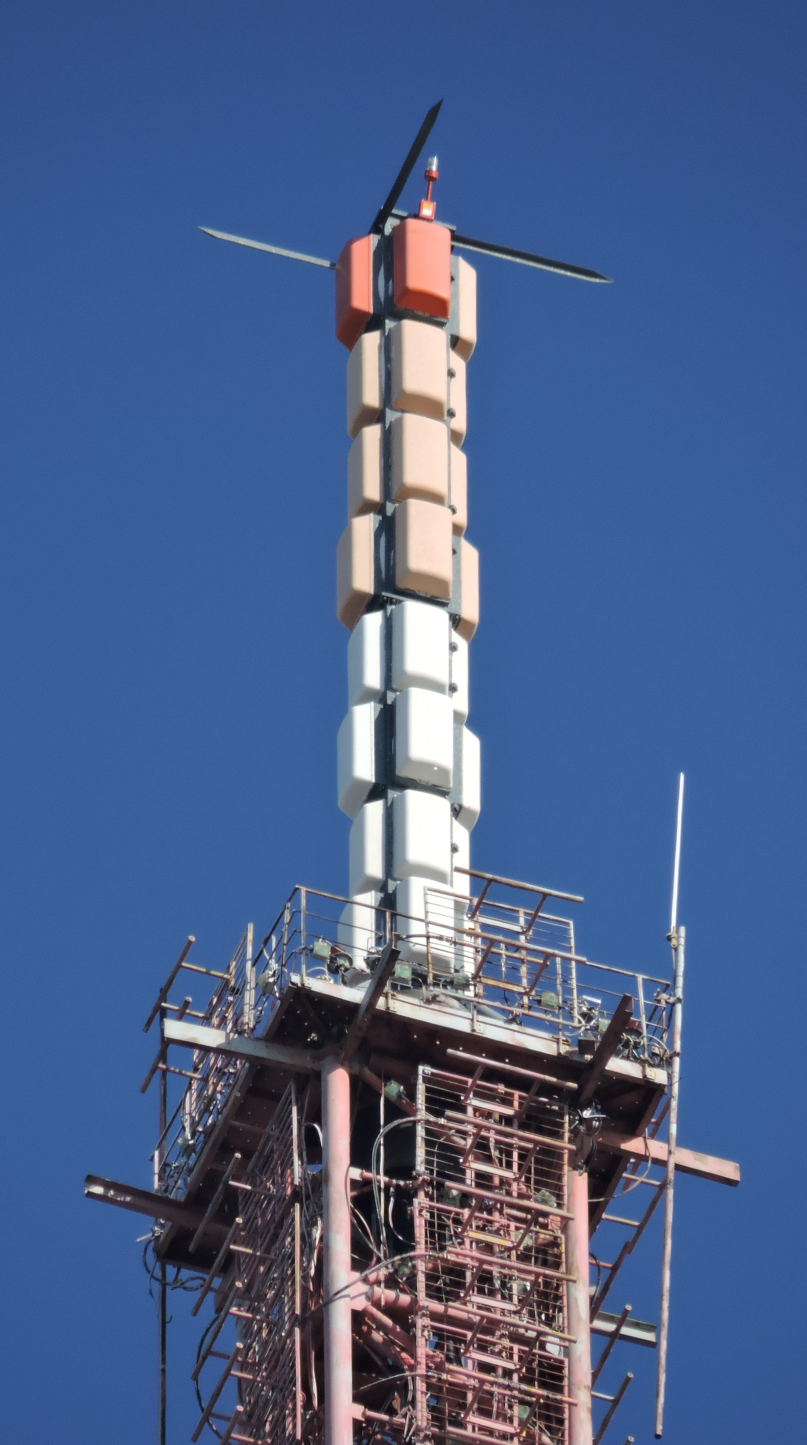 Главная антенна питерской телебашни